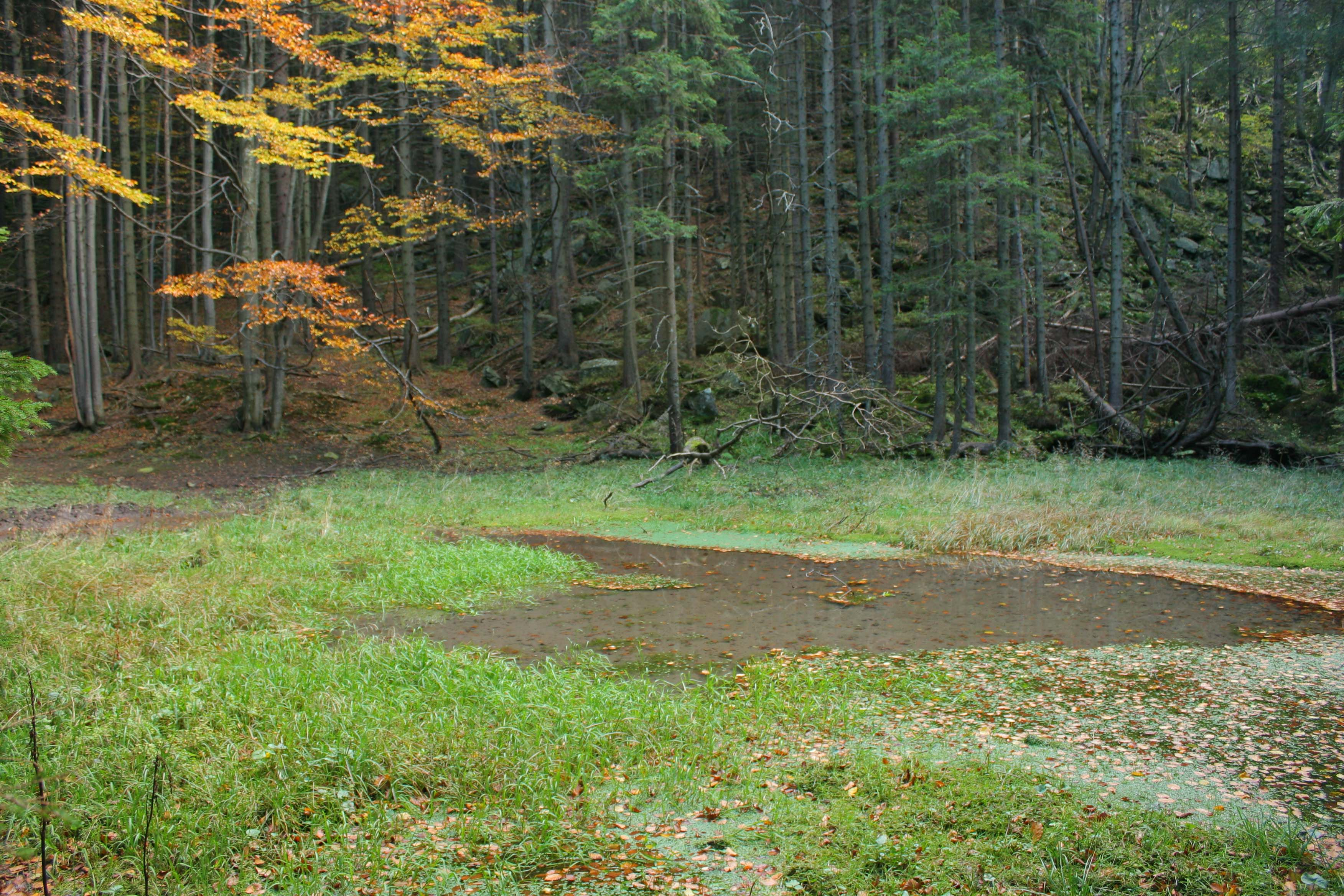 Marków Stawek jesienią. Widok od strony Górnego Płaju.